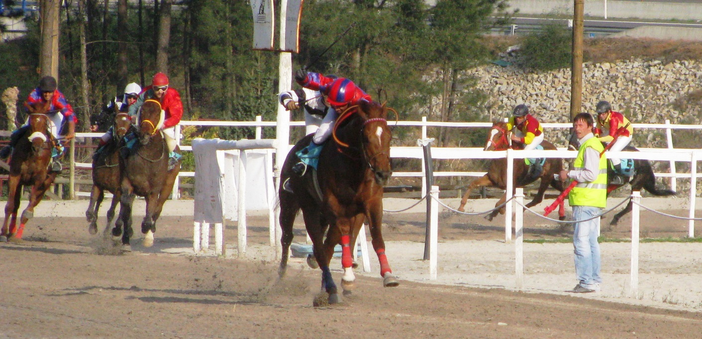 Lovely Silence ganando en el hipodromo Quinta da Granja